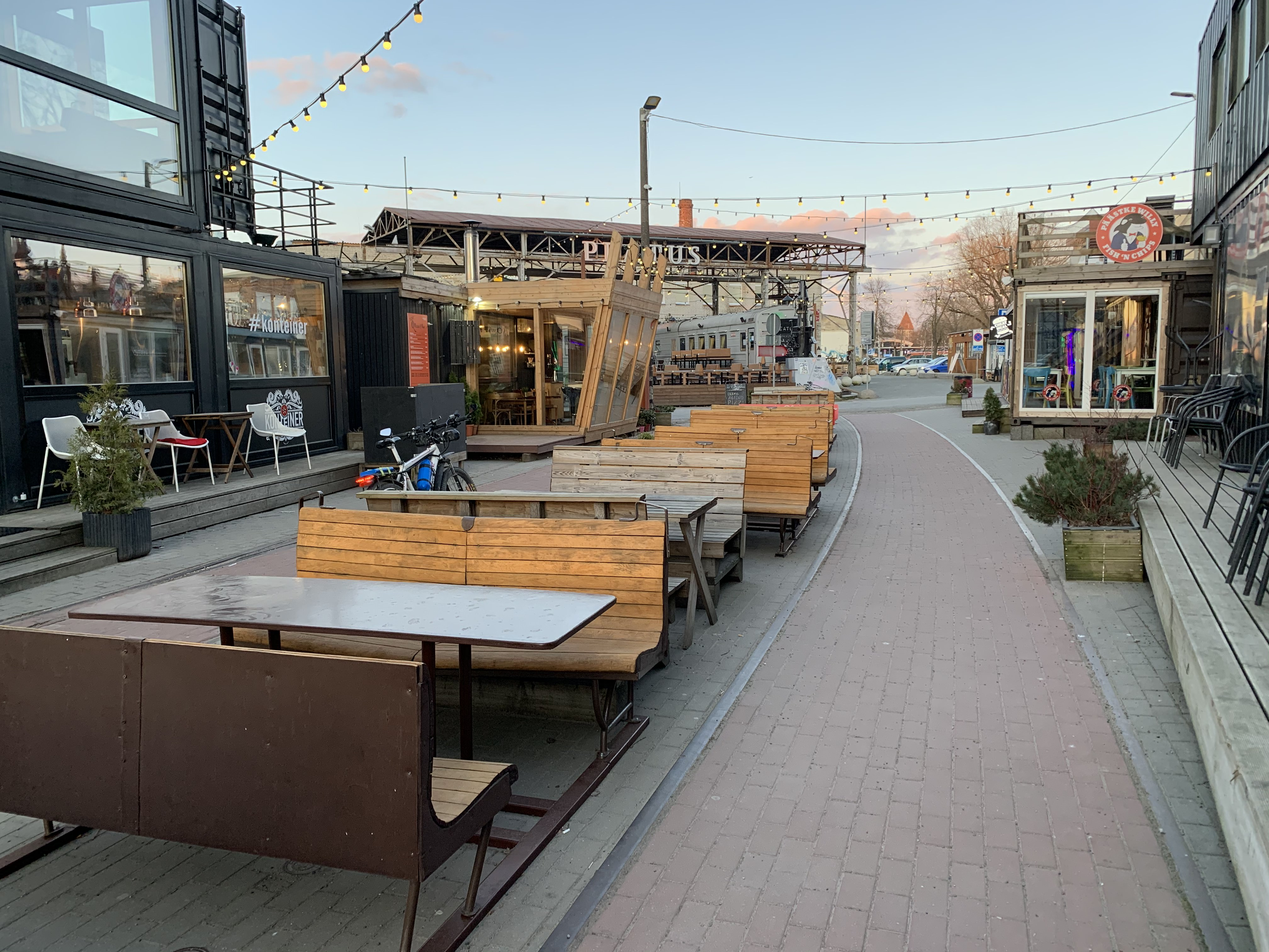 DEPOO toidutänav